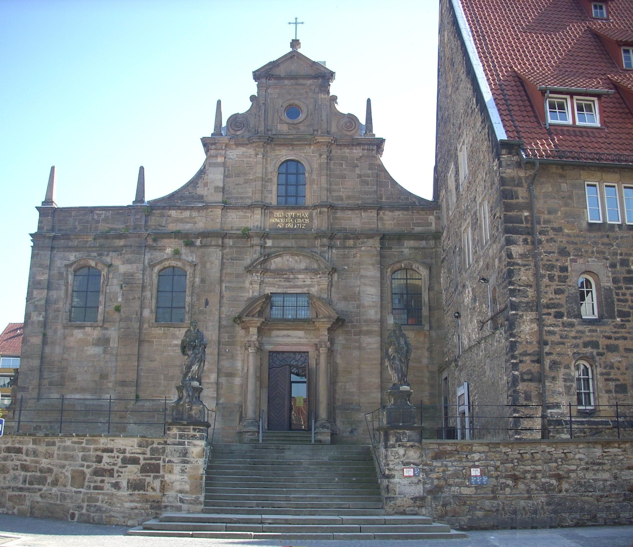 Hildesheim, Kreuzkirche, Westansicht mit der Choralei (rechts)